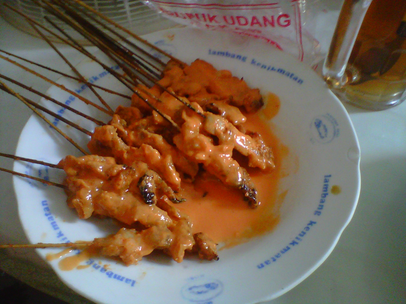 Sate Srepeh khas Rembang, Jawa Tengah, Indonesia